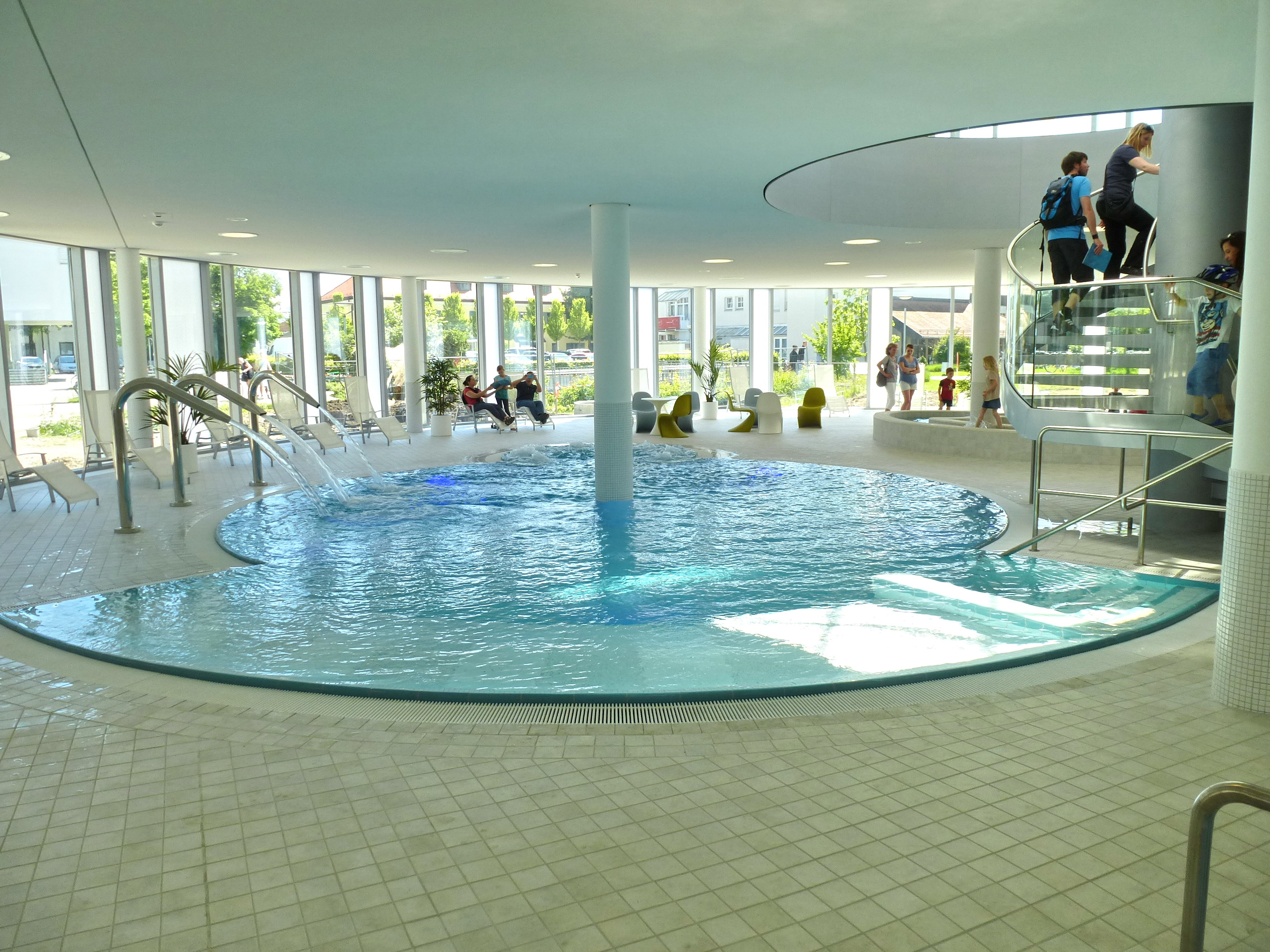 Ismaning, Hallenbad (erbaut 2011-2013)